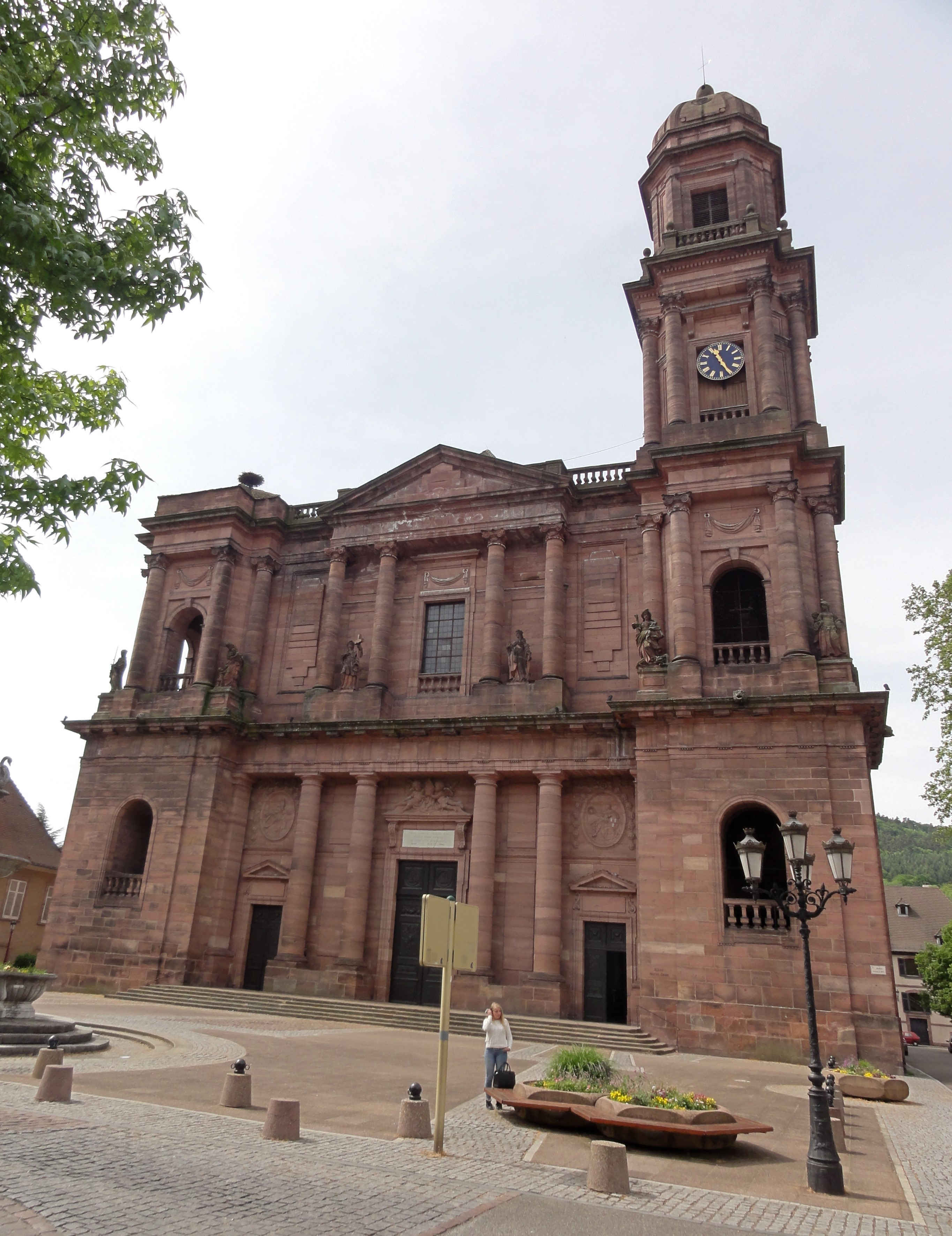 Alsace, Haut-Rhin, Église abbatiale Notre-Dame de Guebwiller (1768-1785), place Jeanne-d'Arc (PA00085438, IA00054832).